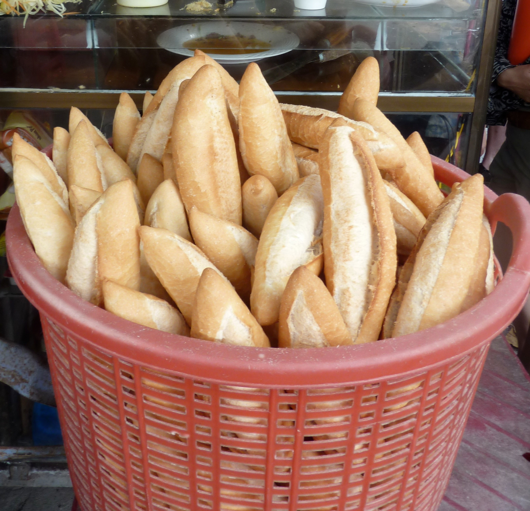 Vietnamesisches Baguette